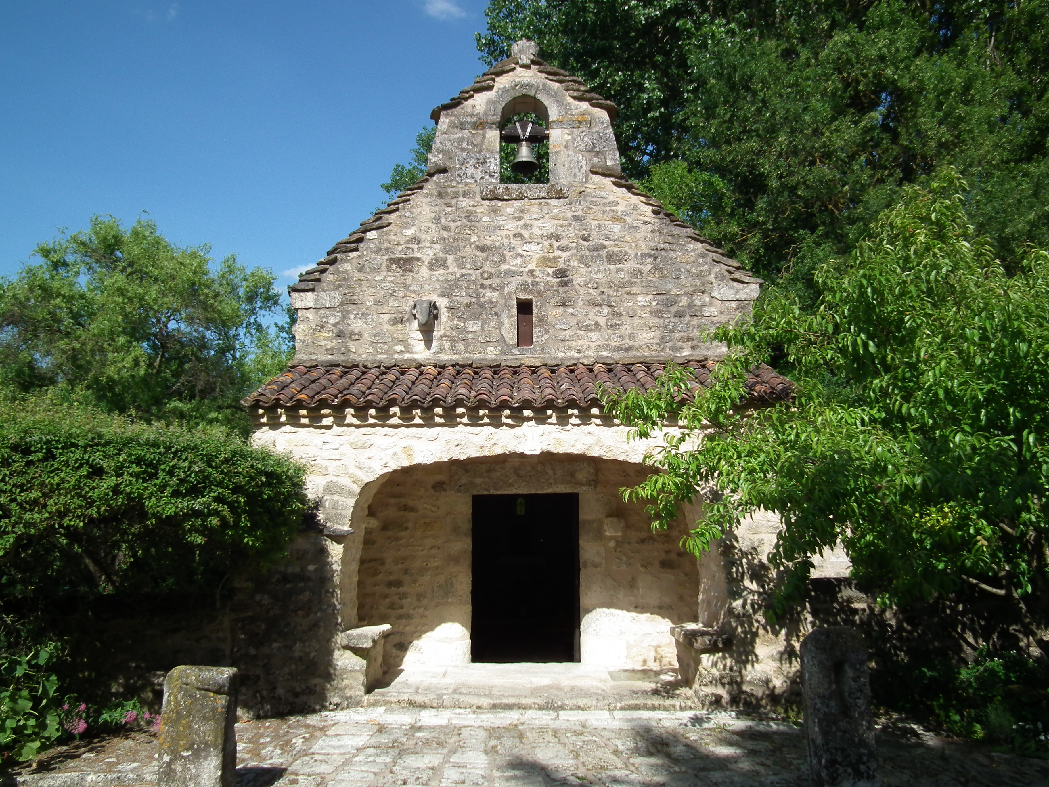 Chapelle Notre-Dame de Colombiers